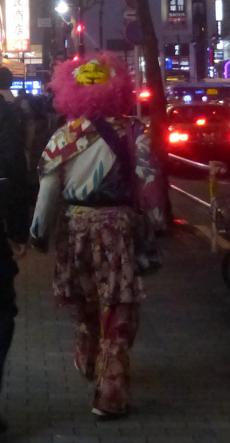 新宿タイガーの後ろ (Behind Shinjuku Tiger)